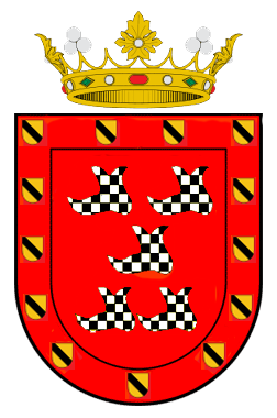 Escudo Marquesado de la Vilueña